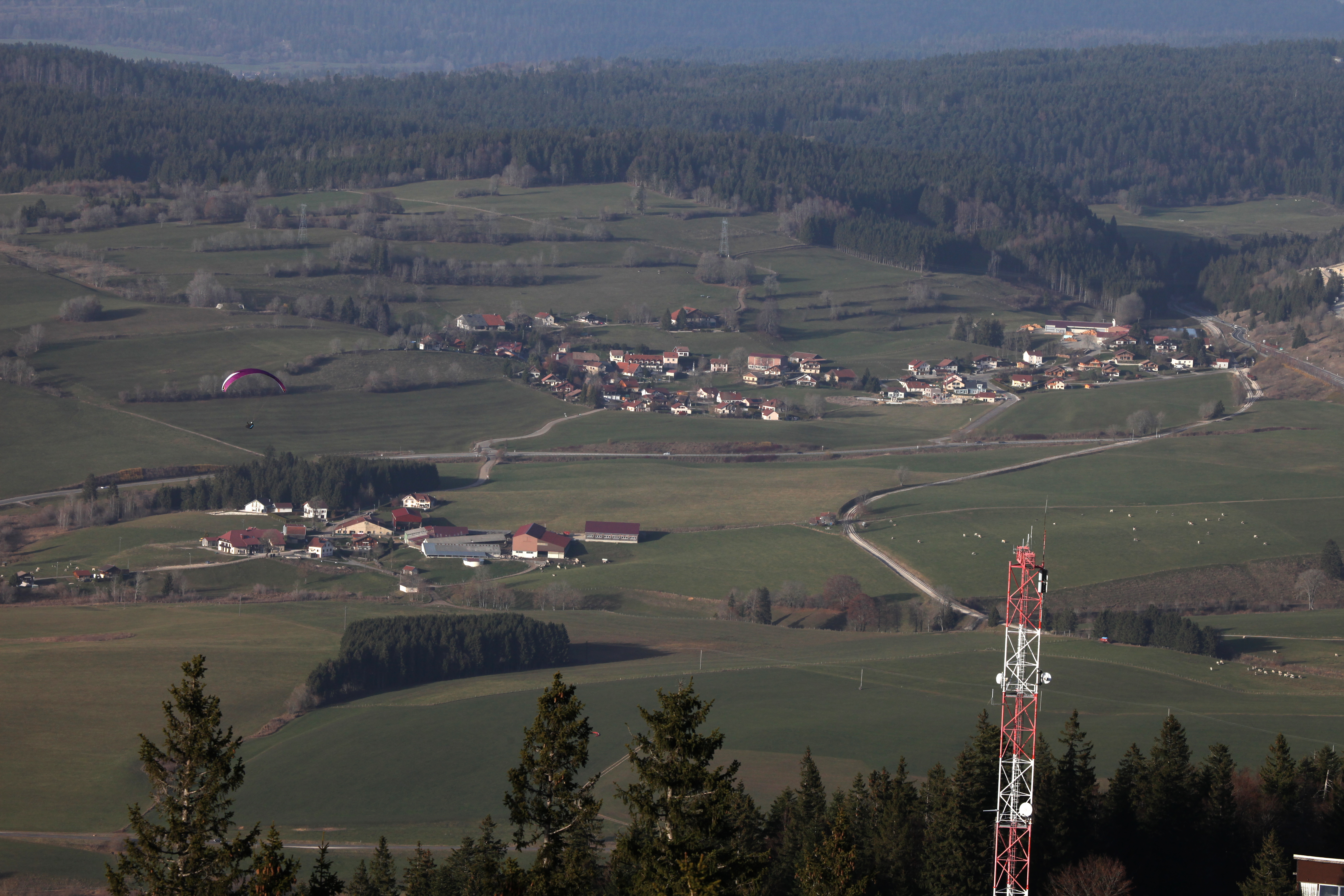 Le village de Touillon et Loutelet vu du Morond.